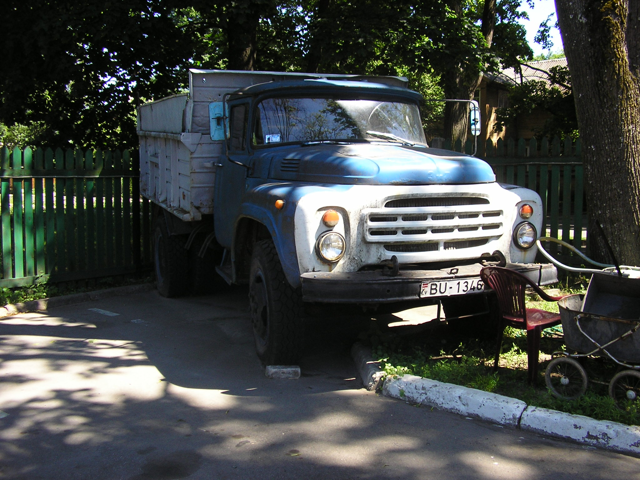 A Zil truck in Rīga.